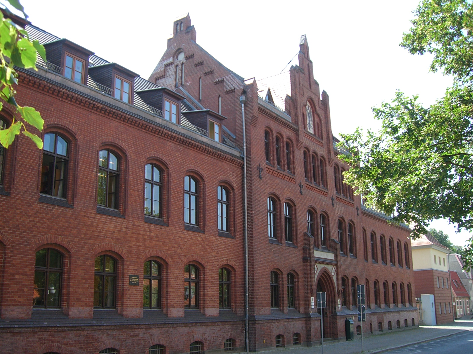 Greifswald